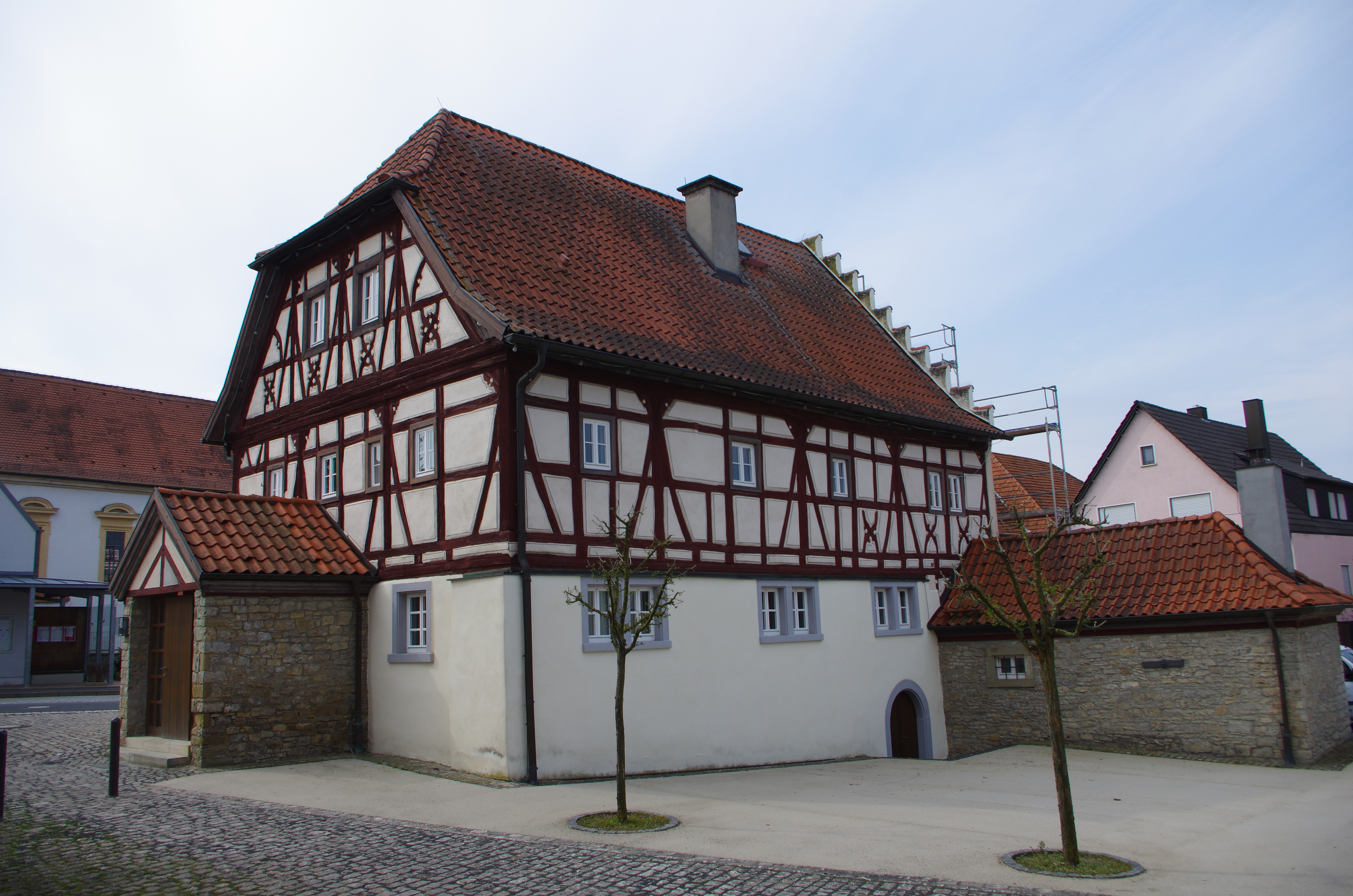 This is a picture of the Bavarian Baudenkmal (cultural heritage monument) with the ID D-6-78-150-60 Ehemaliges Rathaus, Zweigeschossiger Satteldachbau mit Treppengiebel, hintere Giebelseite mit Zierfachwerk, um 1600, Kolitzheimer Straße1, Lindach, Kolitzheim, Unterfranken, Deutschland